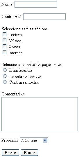 Captura de pantalla de un formulario HTML